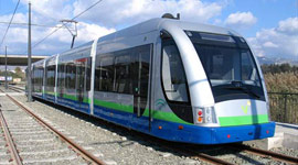 Vélez-Málaga tramway. Tranvía de Vélez-Málaga.